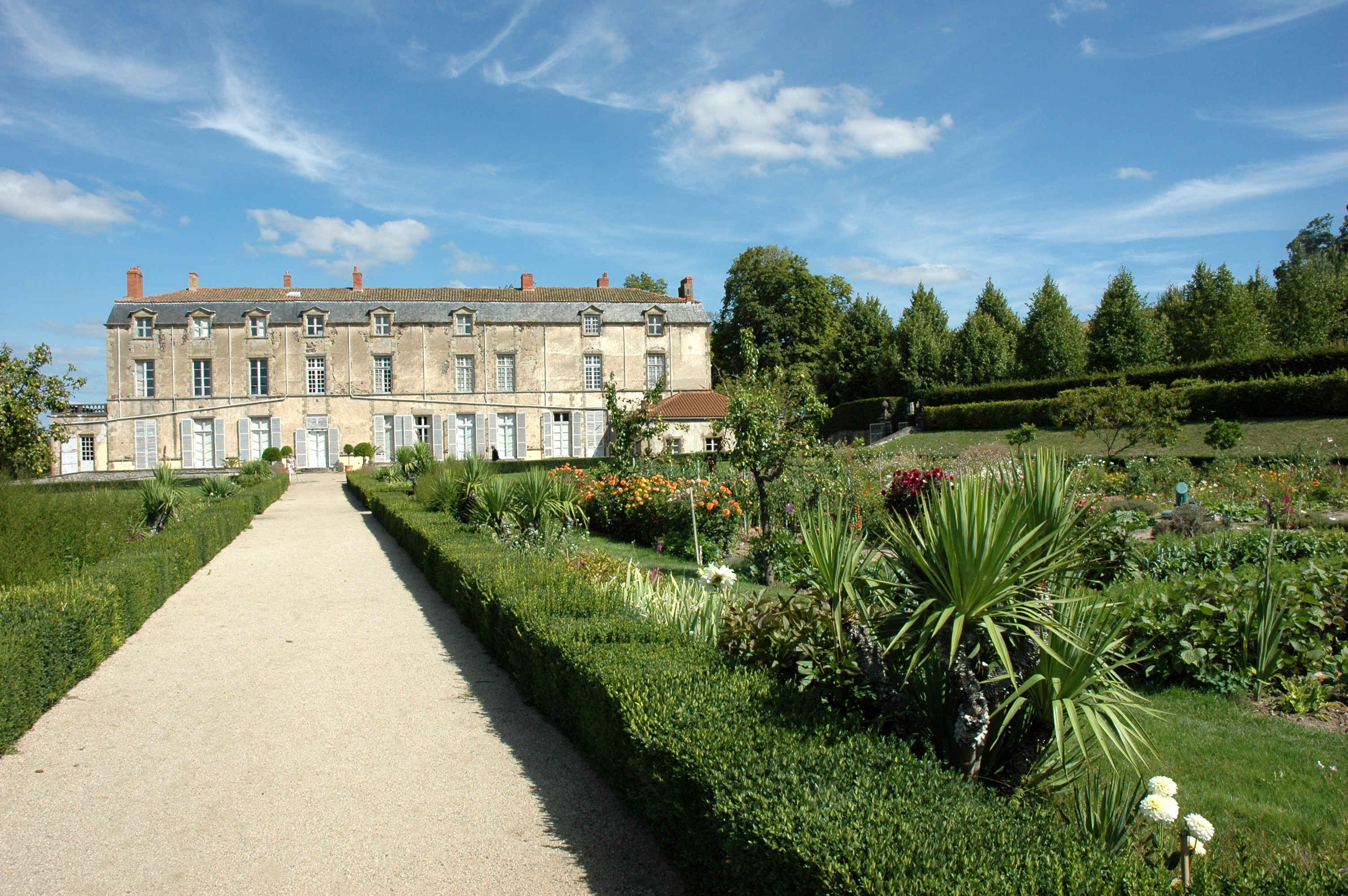 Château d'Hauterive